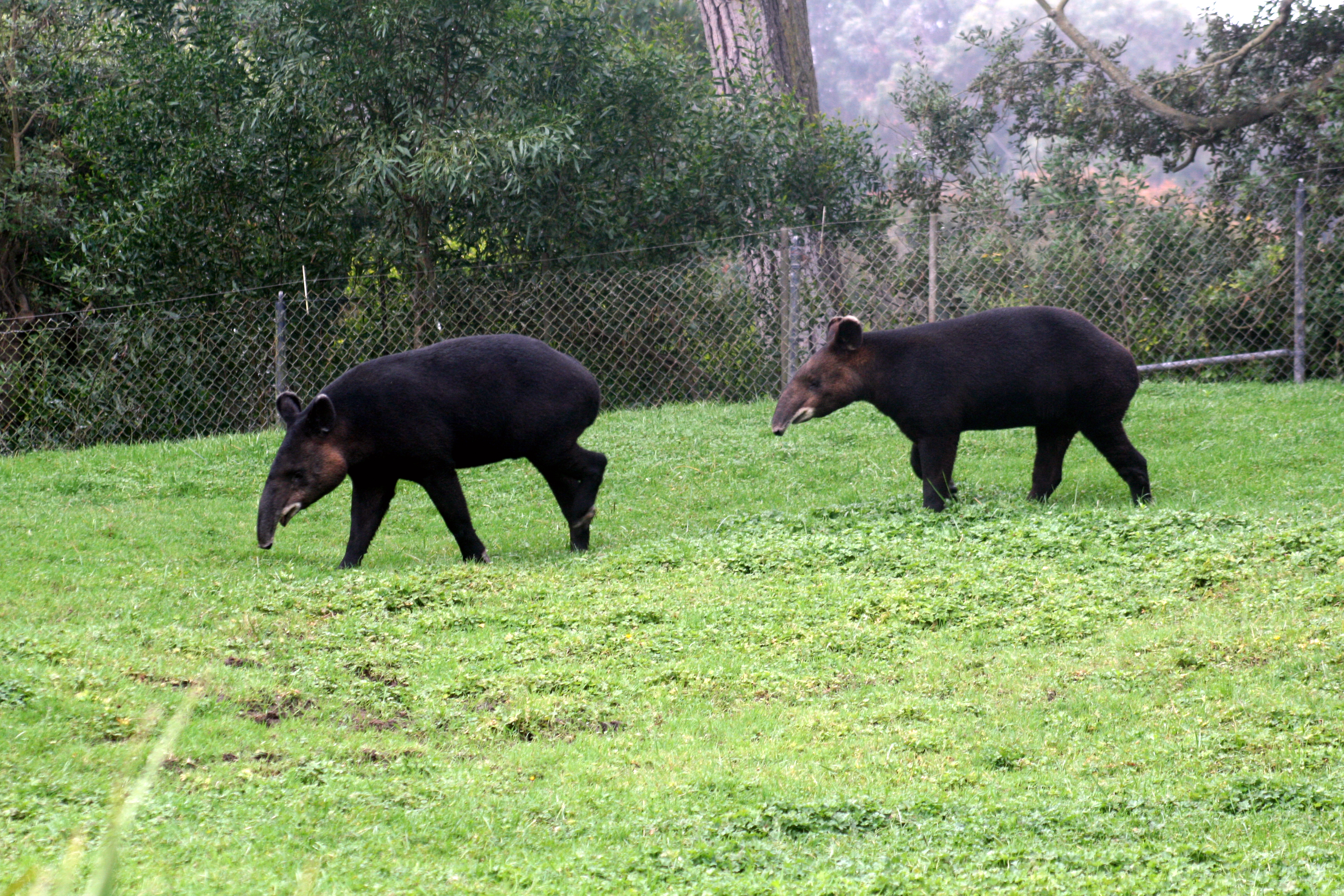 Tapirus pinchaque in San Francisco Zoo